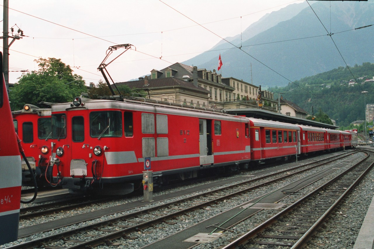 Pendelzug mit Deh 4/4 21 der BVZ, 1 A, 2 B und einem Bt des Typs SIG1 im £Bahnhof Brig, verstärkt mit einem Breda-Panoramawagen.